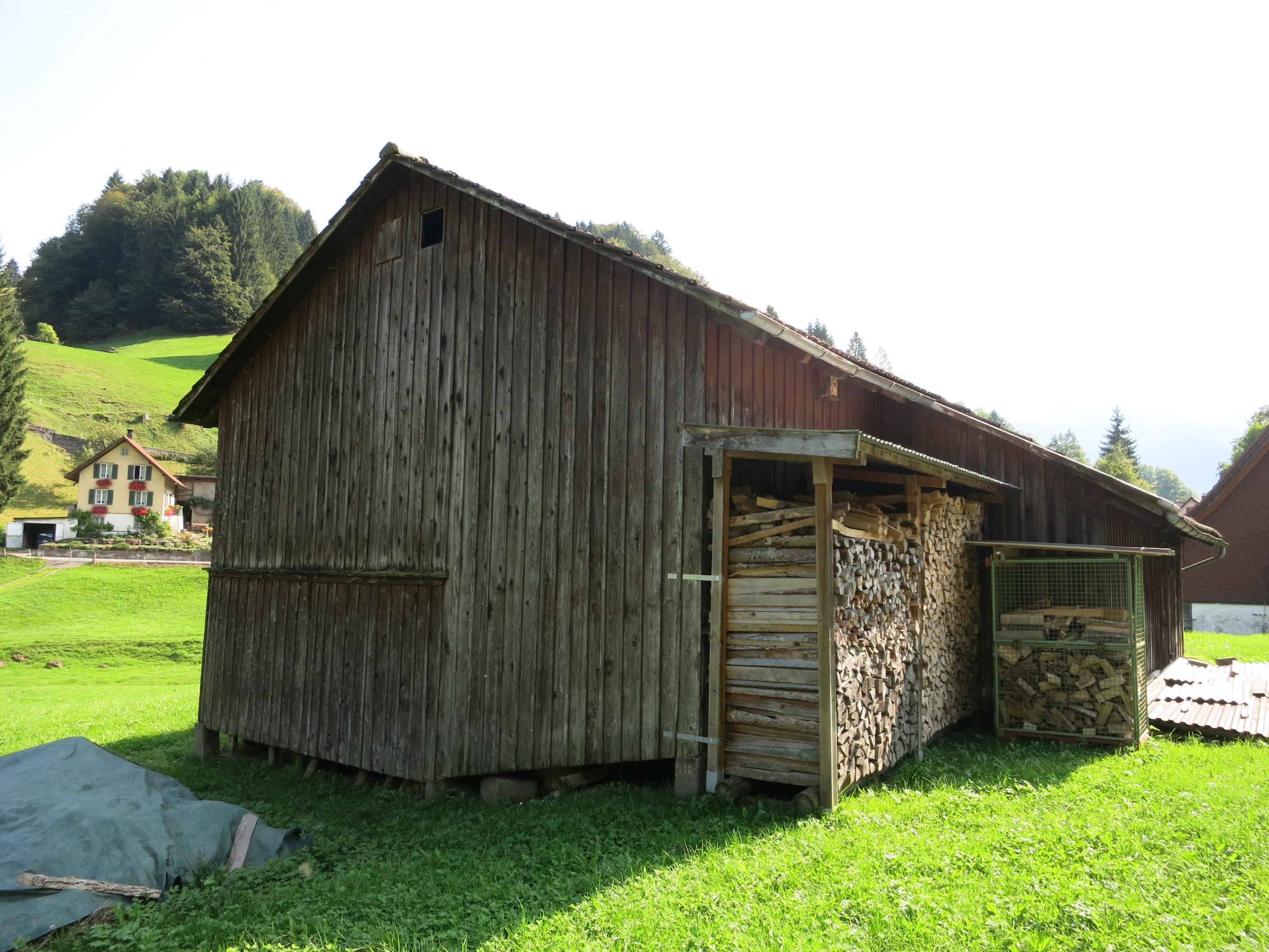 Sperrstelle Wägital SZ, Schweiz